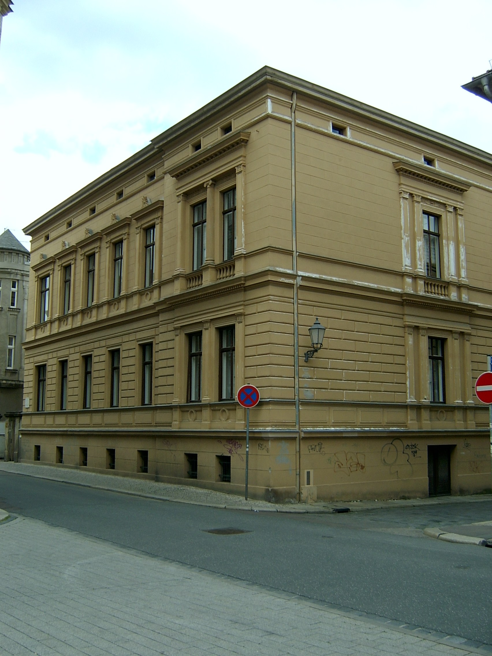 Große Märkerstraße 13 in Halle (Saale)